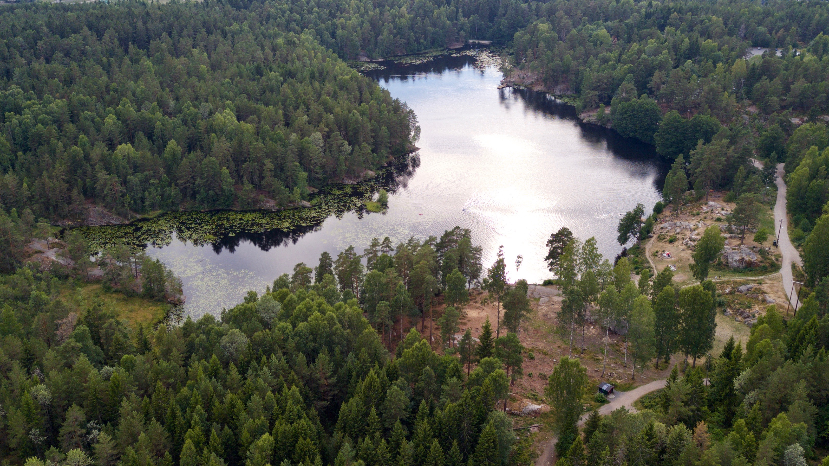 Ulsrudvann. Østmarka i Oslo.